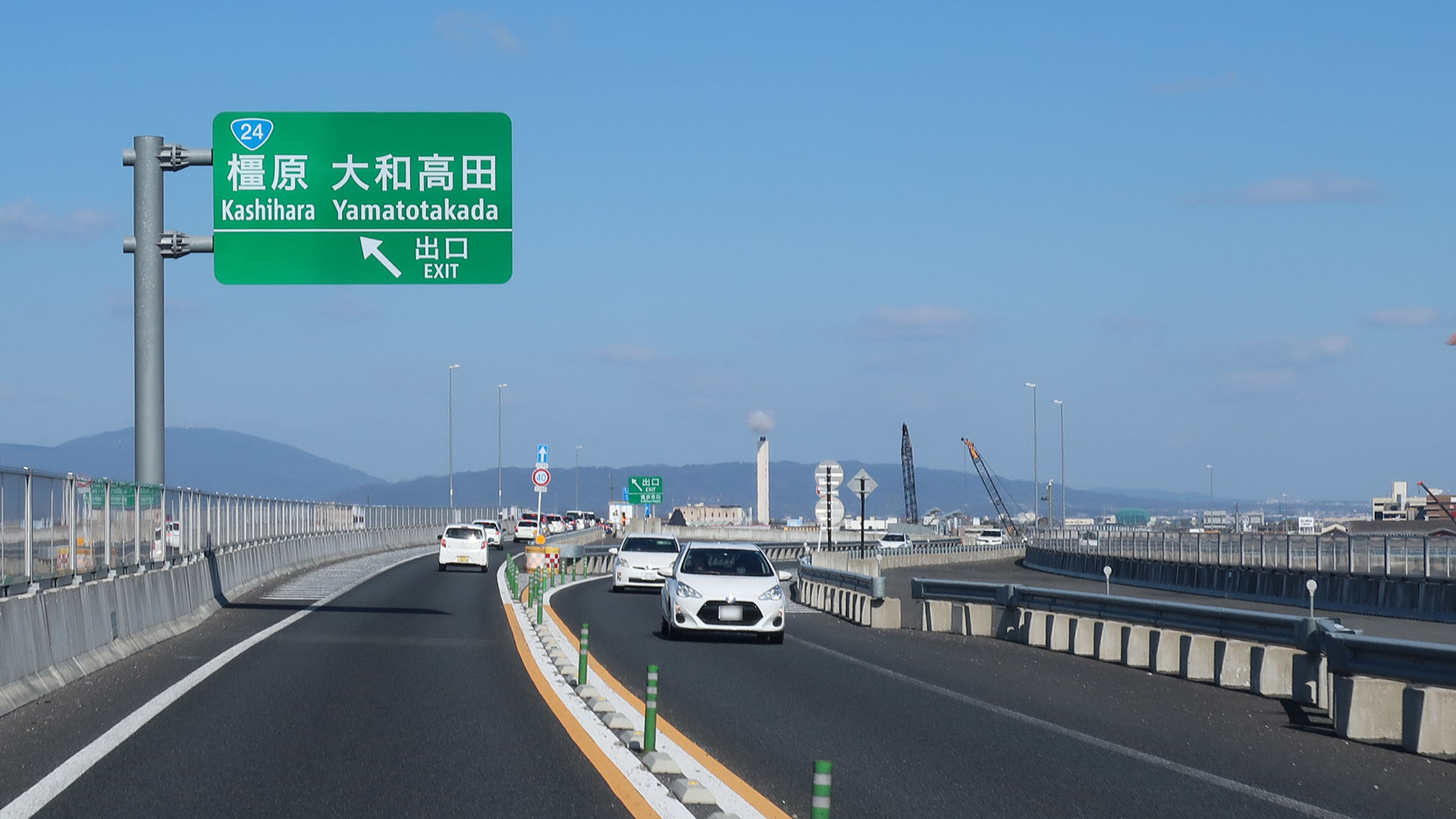 京奈和自動車道 橿原高田IC